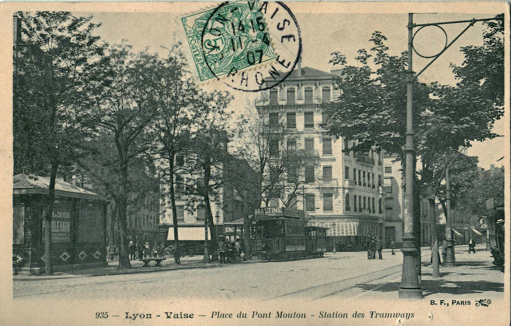 Carte postale ancienne éditée par BF à Paris, n°935 : LYON - VAISE : Place du Pont-Mouton - Station des Tramways